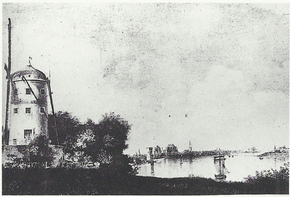 Alteburger Mühle, Köln-Marienburg: Litographie